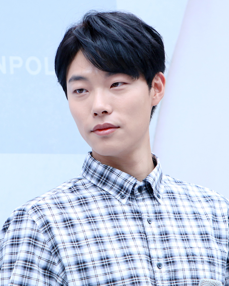 2016년 7월 22일 빈폴 팬사인회에서의 류준열.